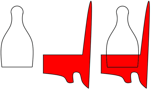 Description de l'image : couronnes égyptiennes